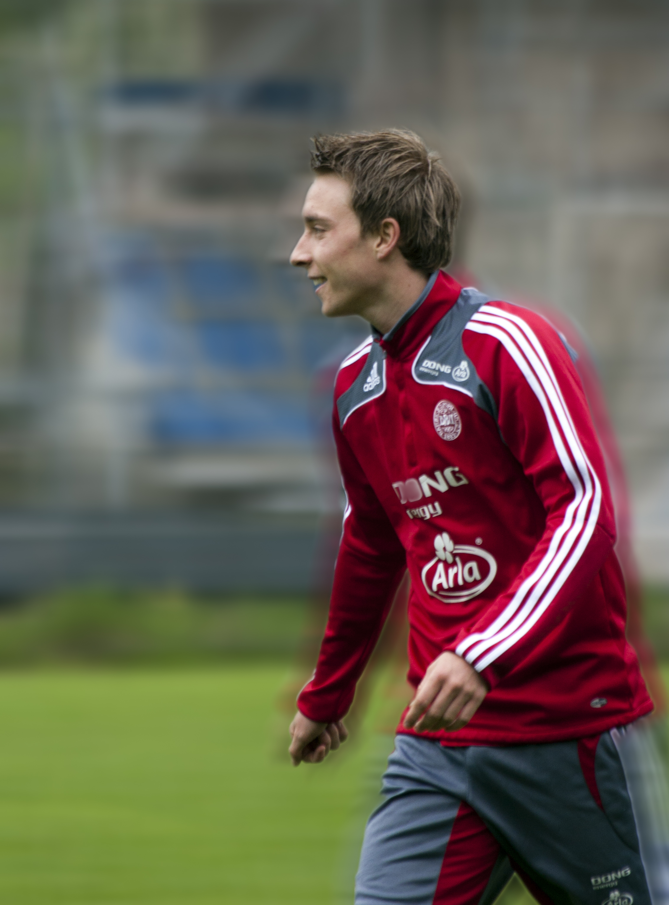 Christian Eriksen